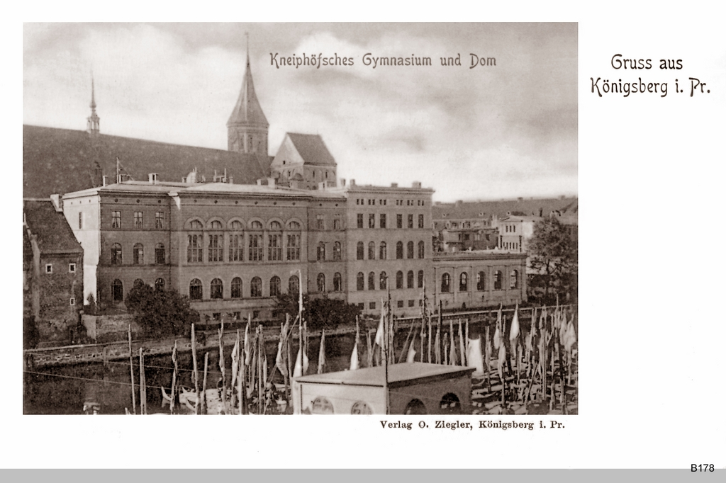 Königsberg